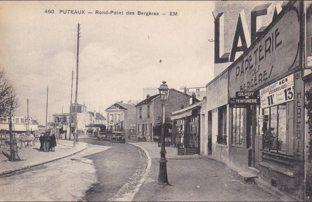 Puteaux.Rond-point des Bergères.Réverbère